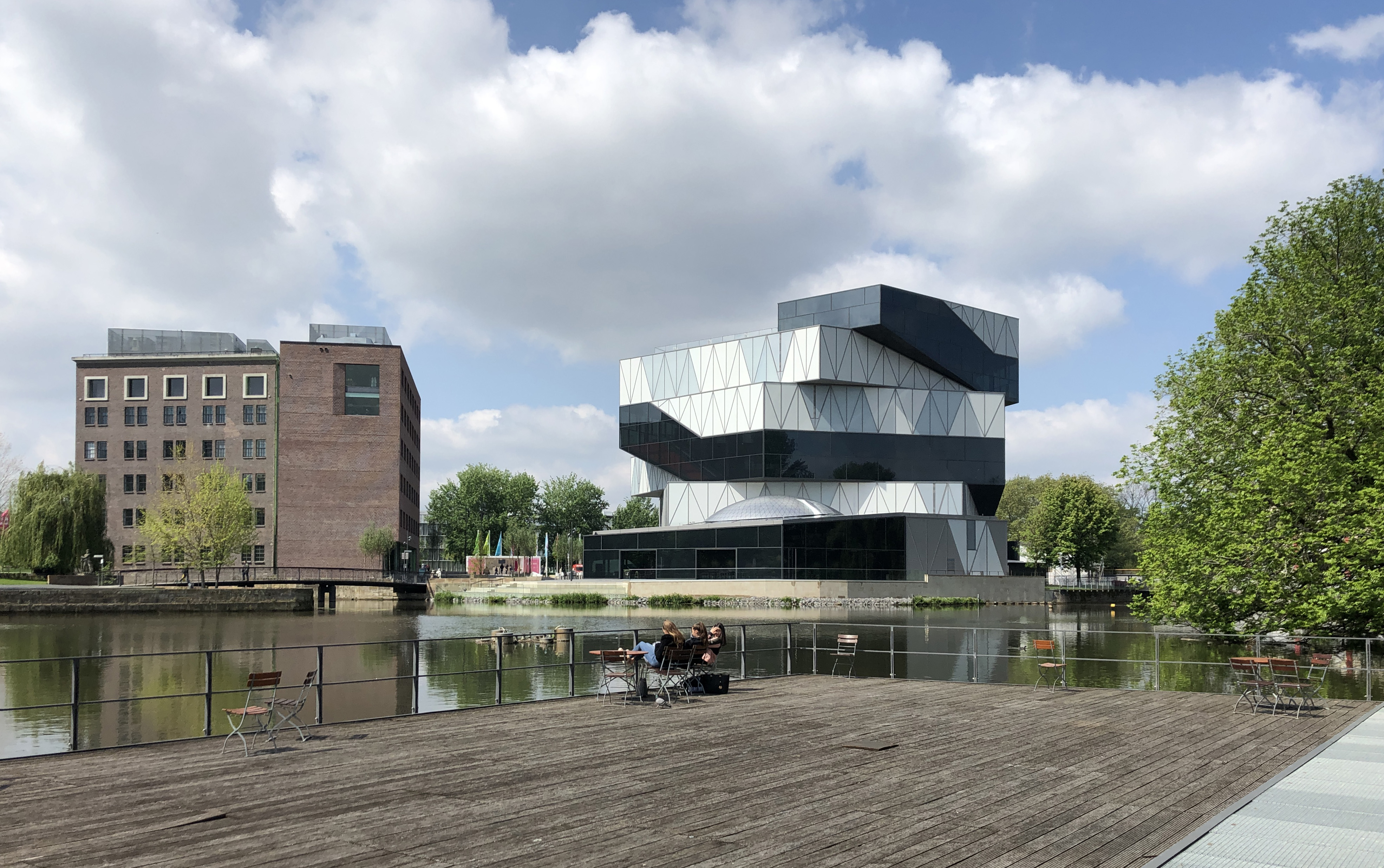 Das Science Center experimenta mit Bestandsbau (links) und Neubau (rechts).